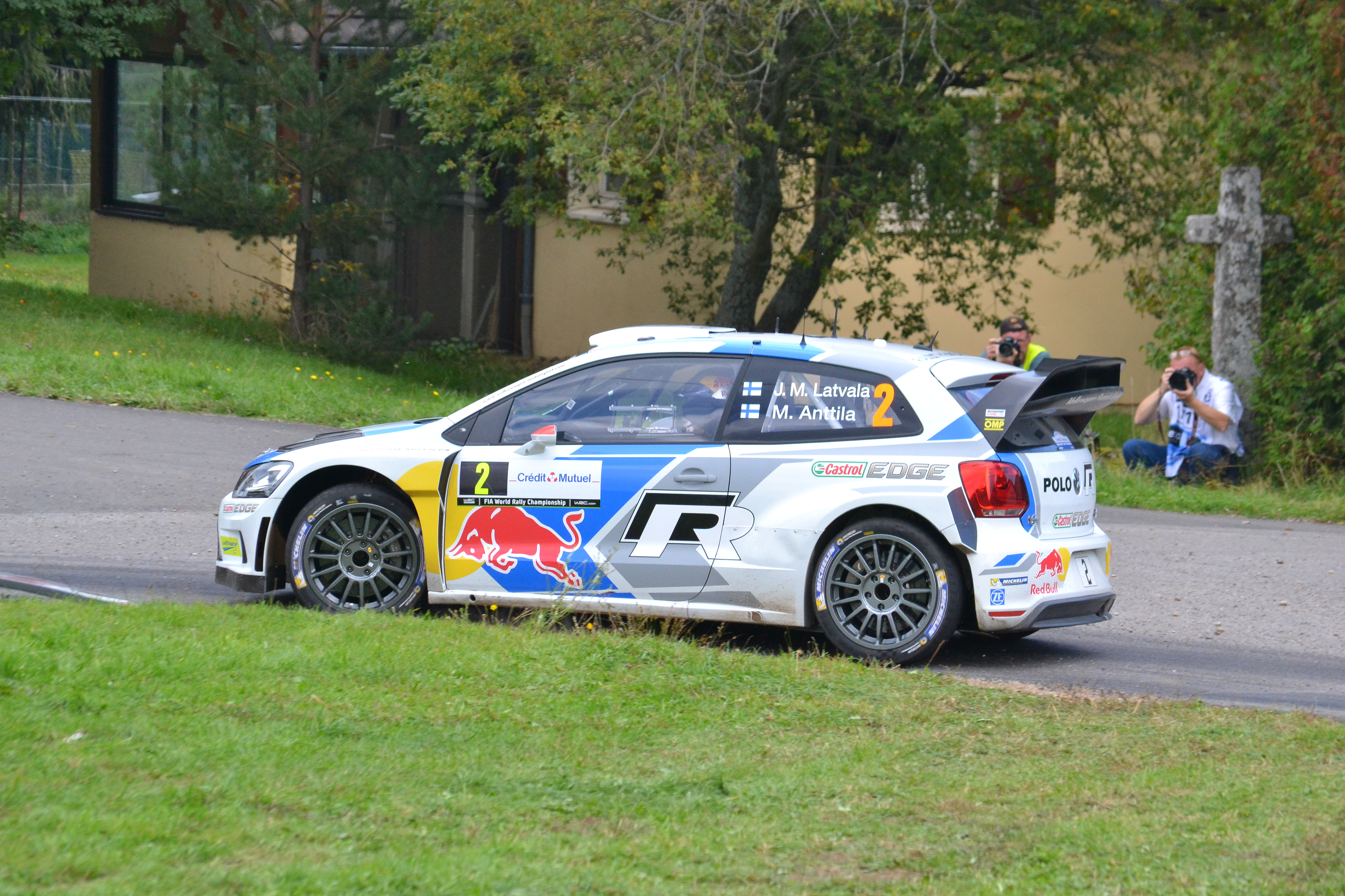 Rallye WRC France-Alsace 2014, ES12 Soultzeren - Le Grand Hohnack 2 à Labaroche. Volkswagen Polo R WRC - Jari-Matti Latvala - Miikka Anttila